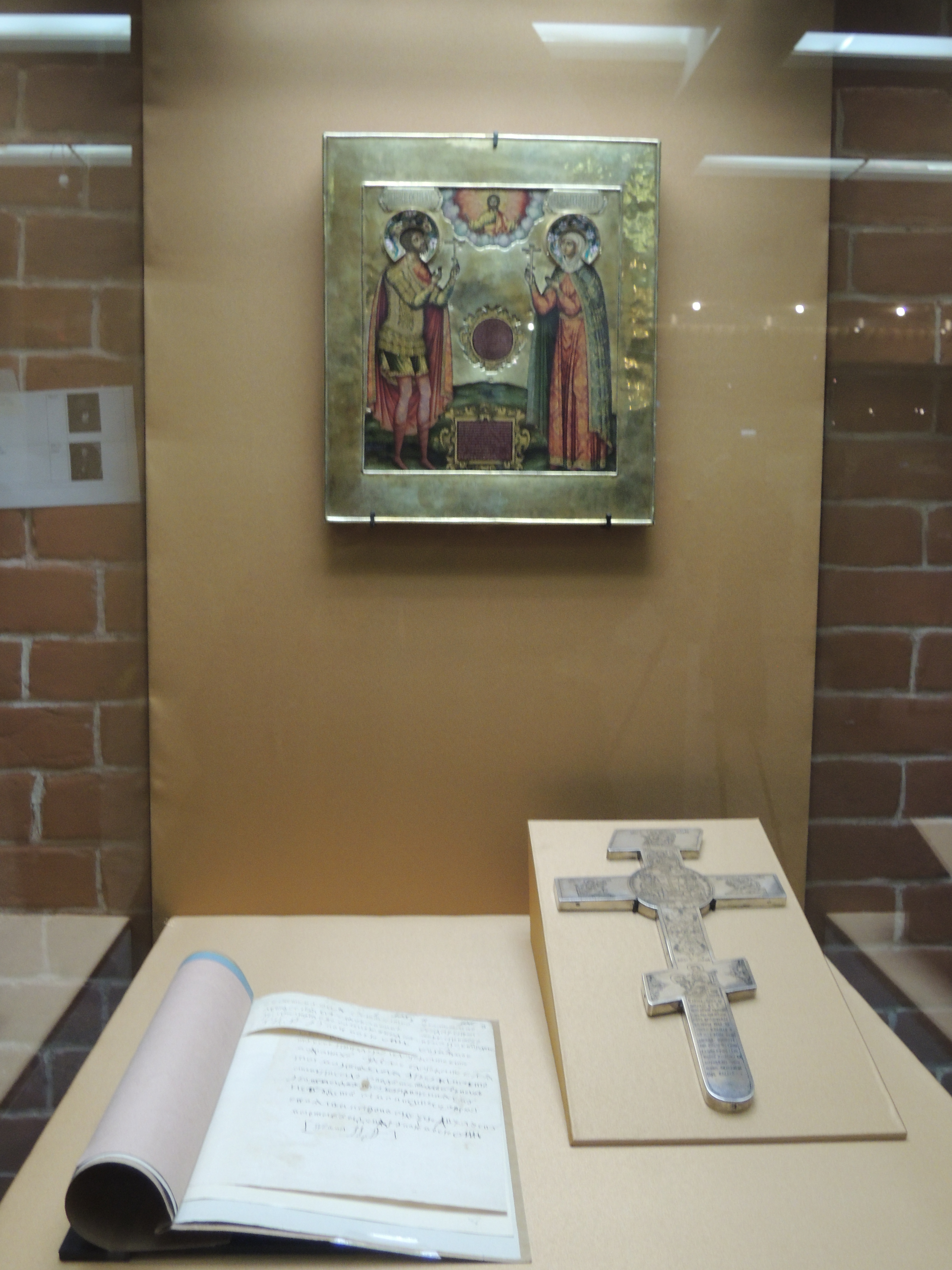 1. Федор Стратилат и великомученица Агафья. Патрональная икона царя Федора Алексеевича и царицы Агафьи. 1681, Мастера Оружейной палаты. ГИМ. (Вклад царя Федора Алексеевича и царицы Агафьи Семеновны Грушецкой в Александровский Успенский монастырь) 2. Крест напрестольный. Москва, 1679. Вклад царя Федора Алексеевича в церковь Иоанна Белоградского, "что у него великого государя в Верху". ГИМ 3. 1682, 1 марта. Письмо царя Федора Алексеевича к чернецу Сильвестру медведеву о предстоящей свадьбе с Марфой Апраксиной. Автограф. РГАДА